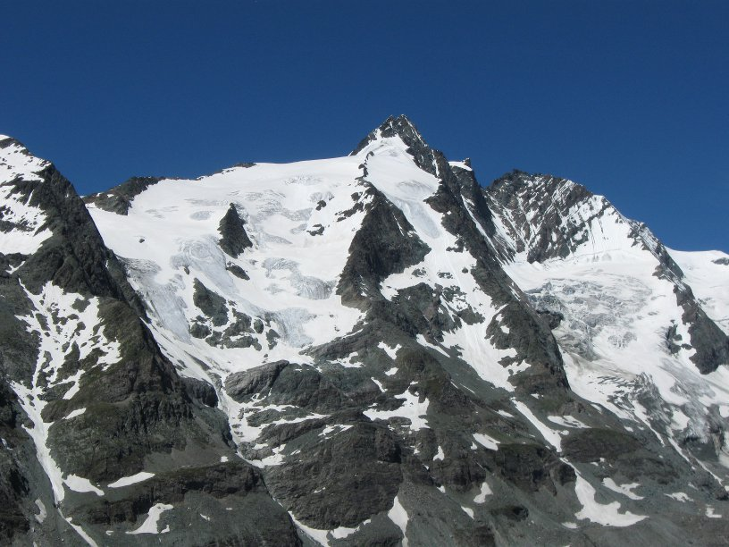 Der Großglockner ist der höchste Berg der Glocknergruppe